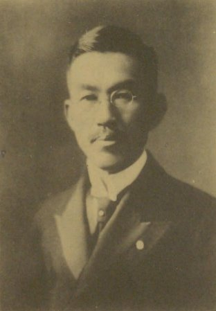 有吉忠一（1873-1947）